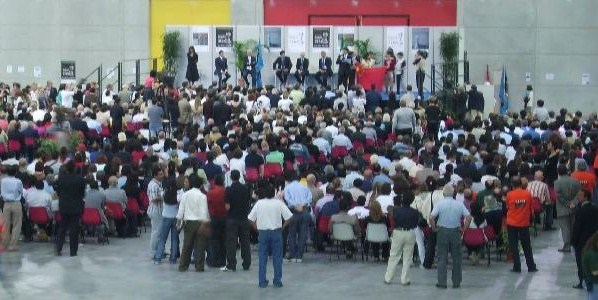 Siegerehrung bei der Schacholympiade 2006 in Turin